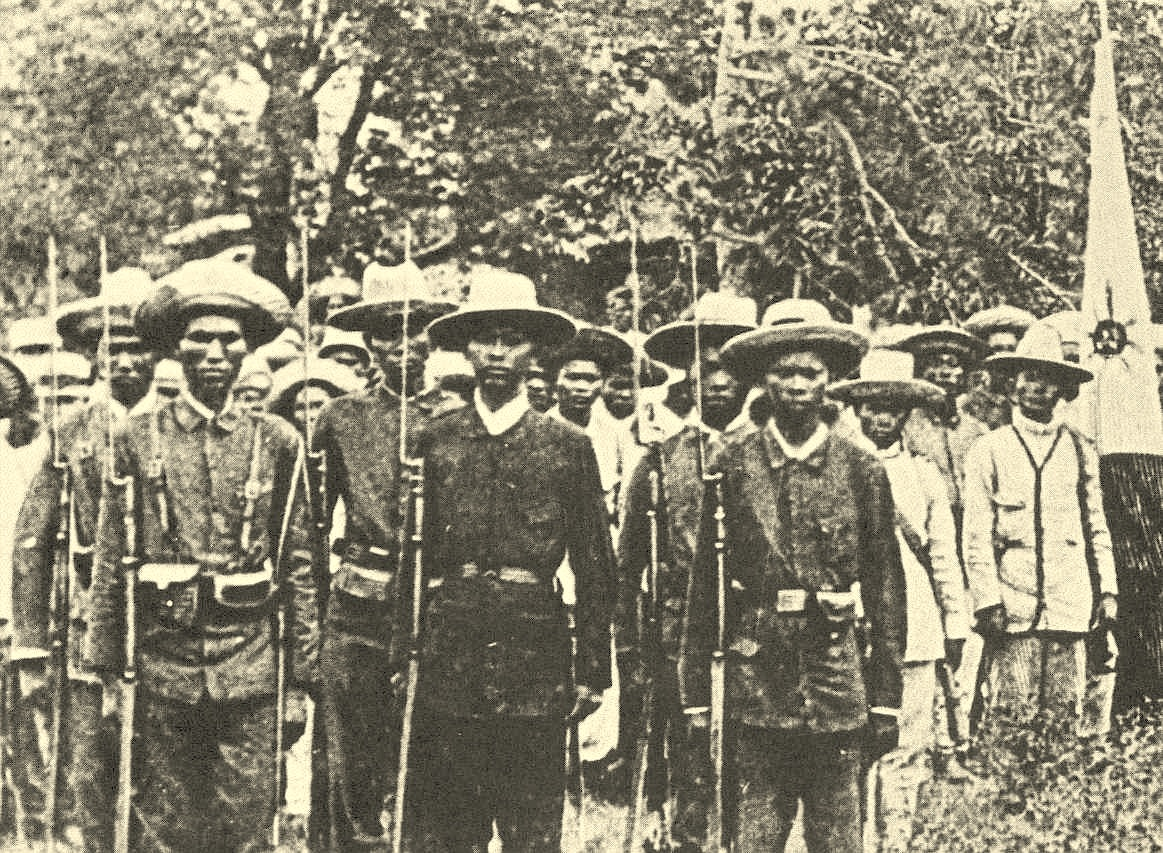 Ilokano: Katipuneros Tagalog: Mga katipunero